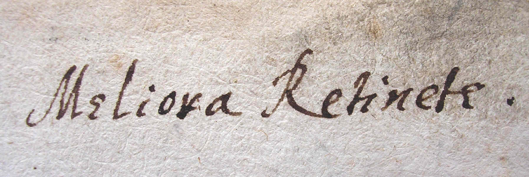 Devise de John Evelyn : Meliora retinete = ne retenez que le meilleur